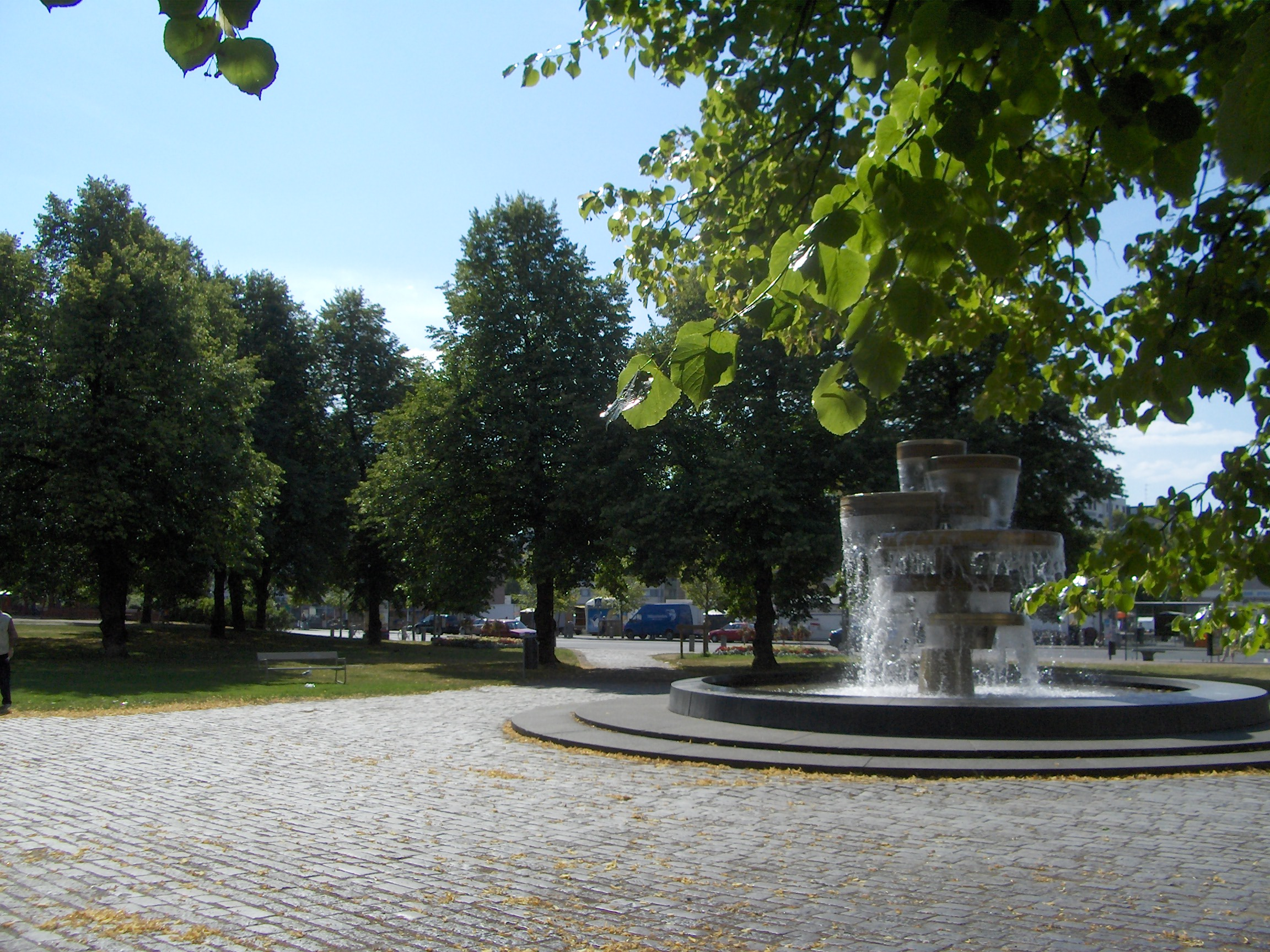 Emil Aaltonen park in Tampere